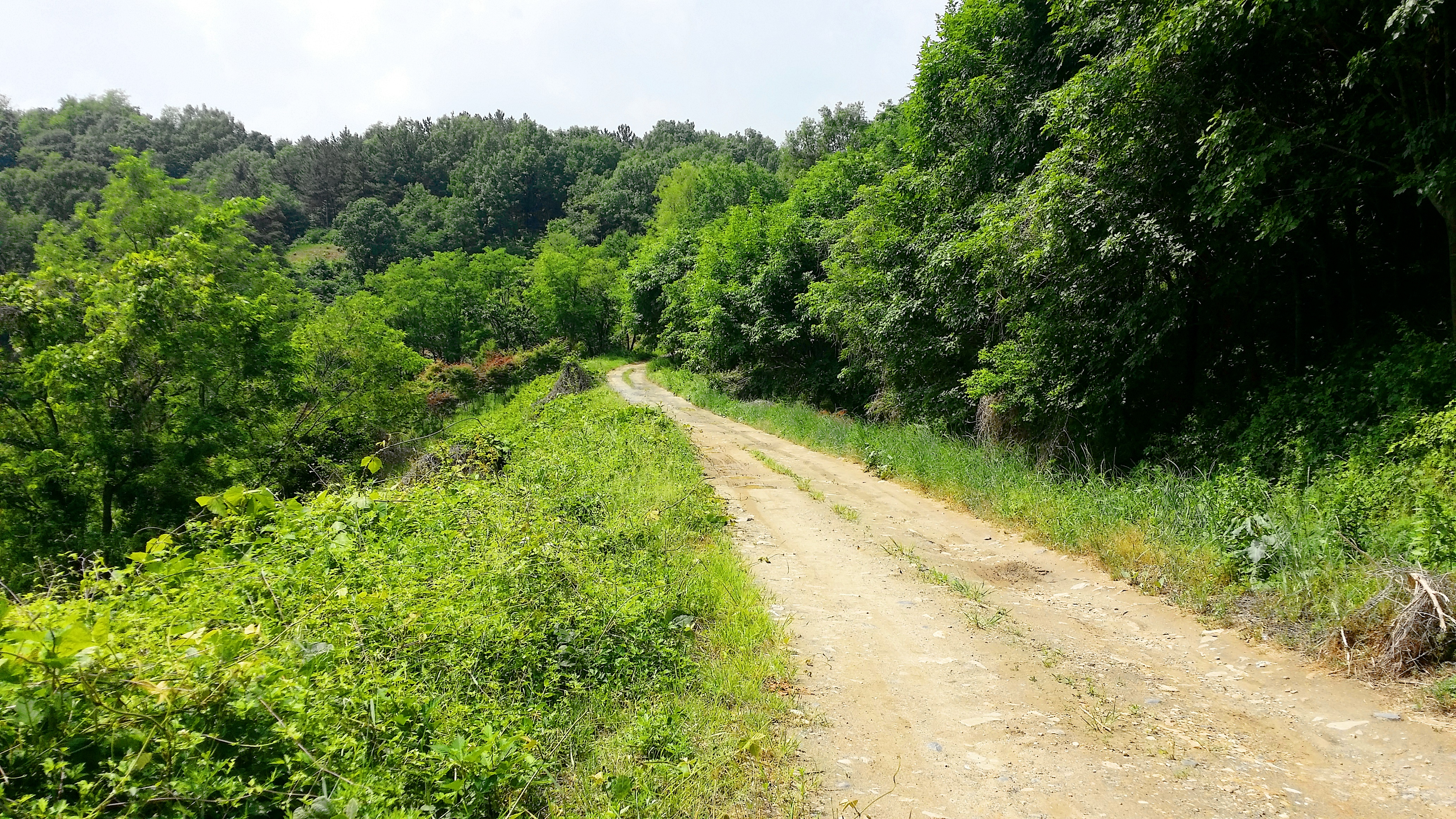 대청호오백리길 2구간